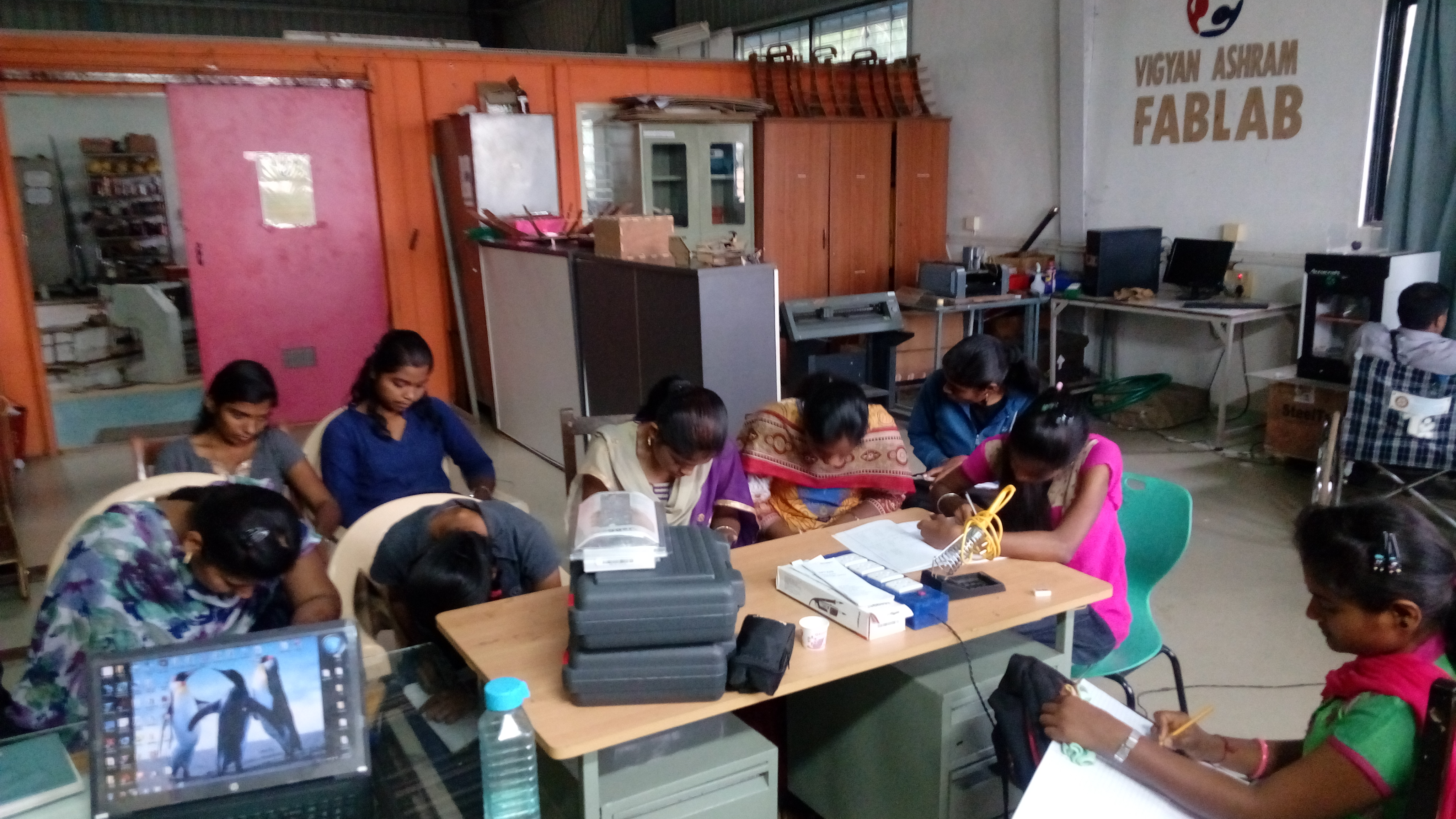 digital दागिने बनवण्याची कार्यशाळा